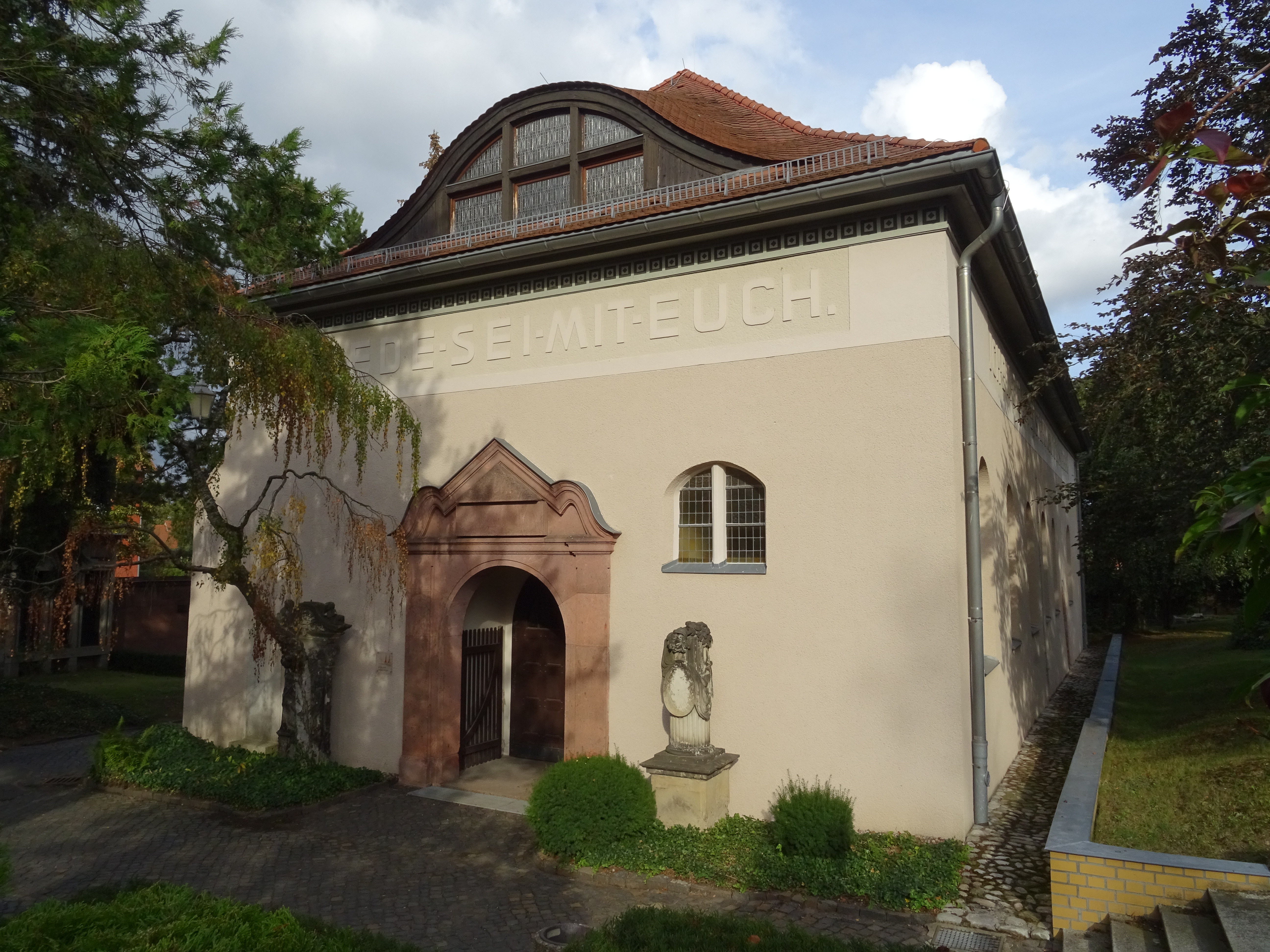 Friedhofskirche Heilig Kreuz in Grimma. Von 1556 bis 1559 erbaut. 1607 umgebaut und 1910 erneut umgebaut und erhöht. Mit historischen spätgotischen Flügelaltar (entstanden um 1519) stammt aus der 1888 abgerissenen Grimmaer Nicolaikirche. Er enthält reich ausgestattete Schnitzwerke und Bilder aus der Cranachschen Schule.